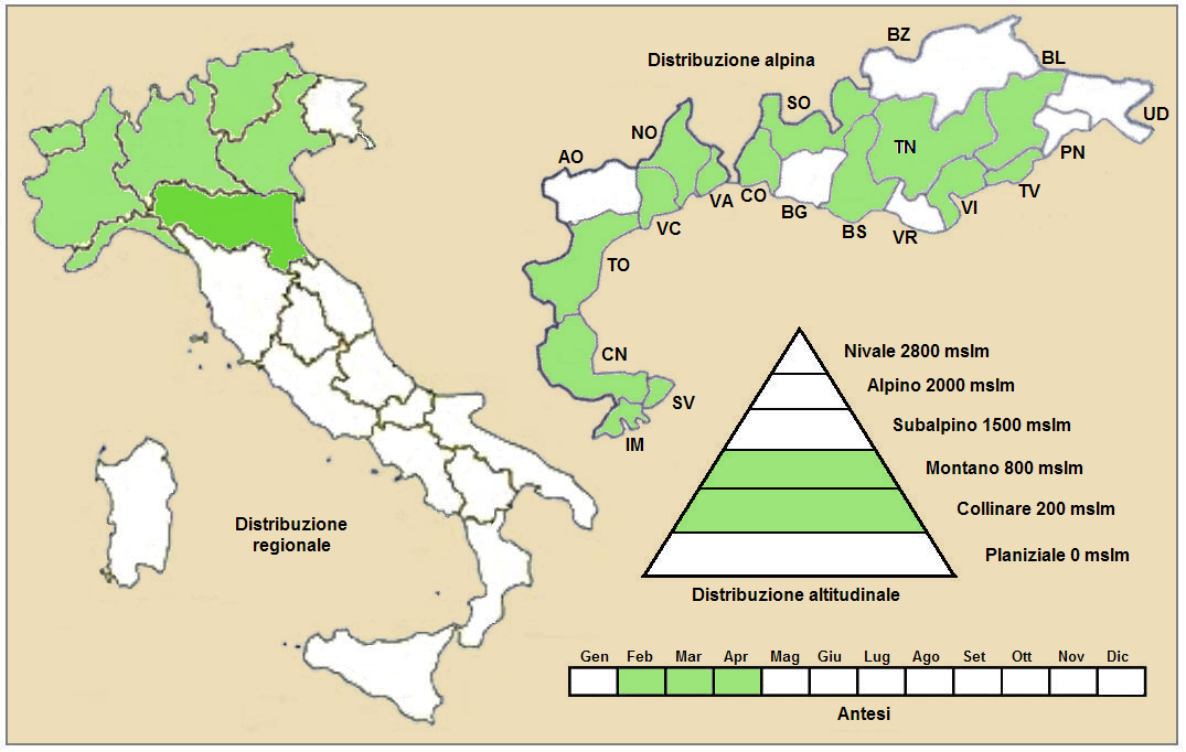 Helleborus viridis - Distribuzione